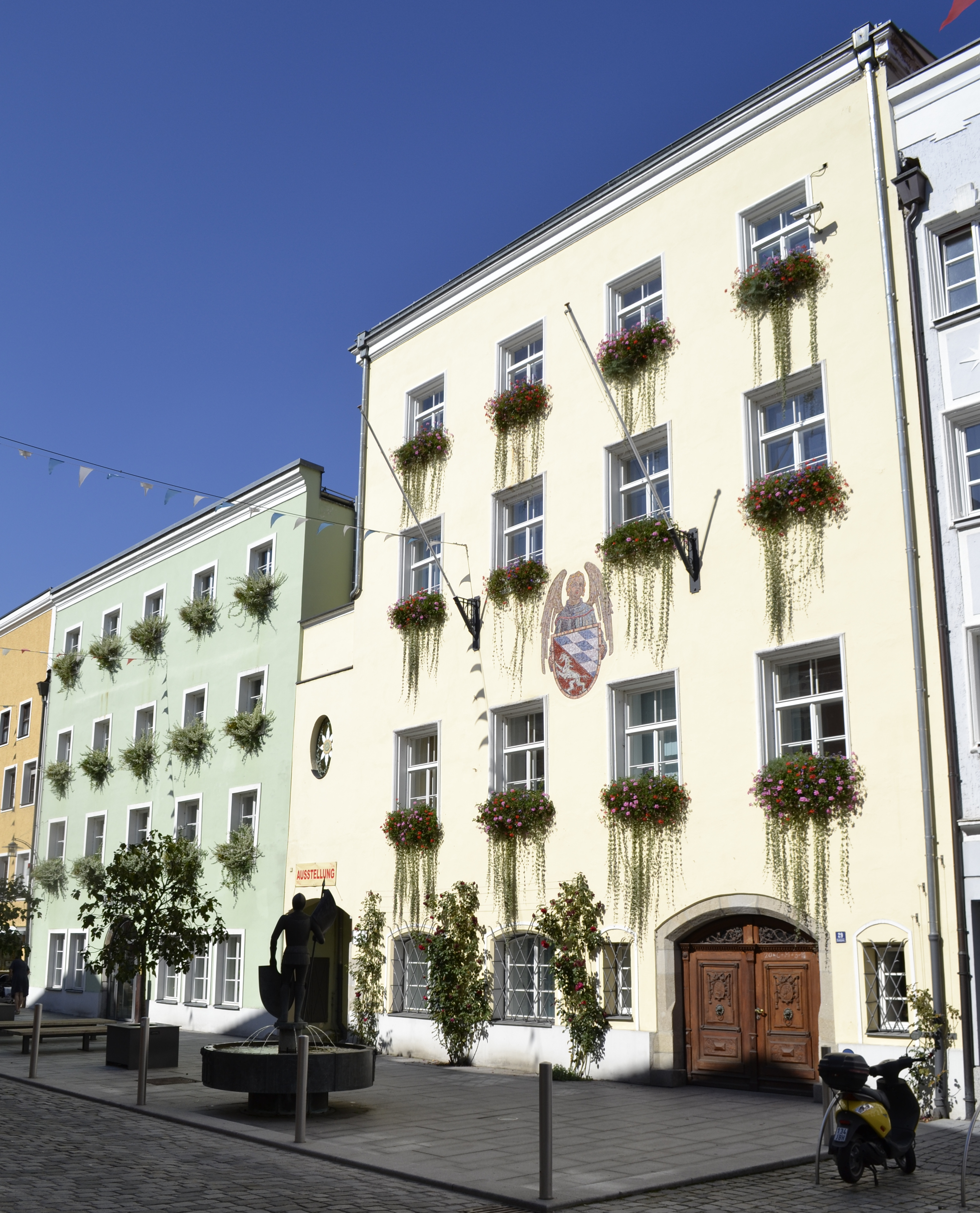 Die beiden Gebäude des Rathauses am Stadtplatz von Vilshofen a.d. Donau.